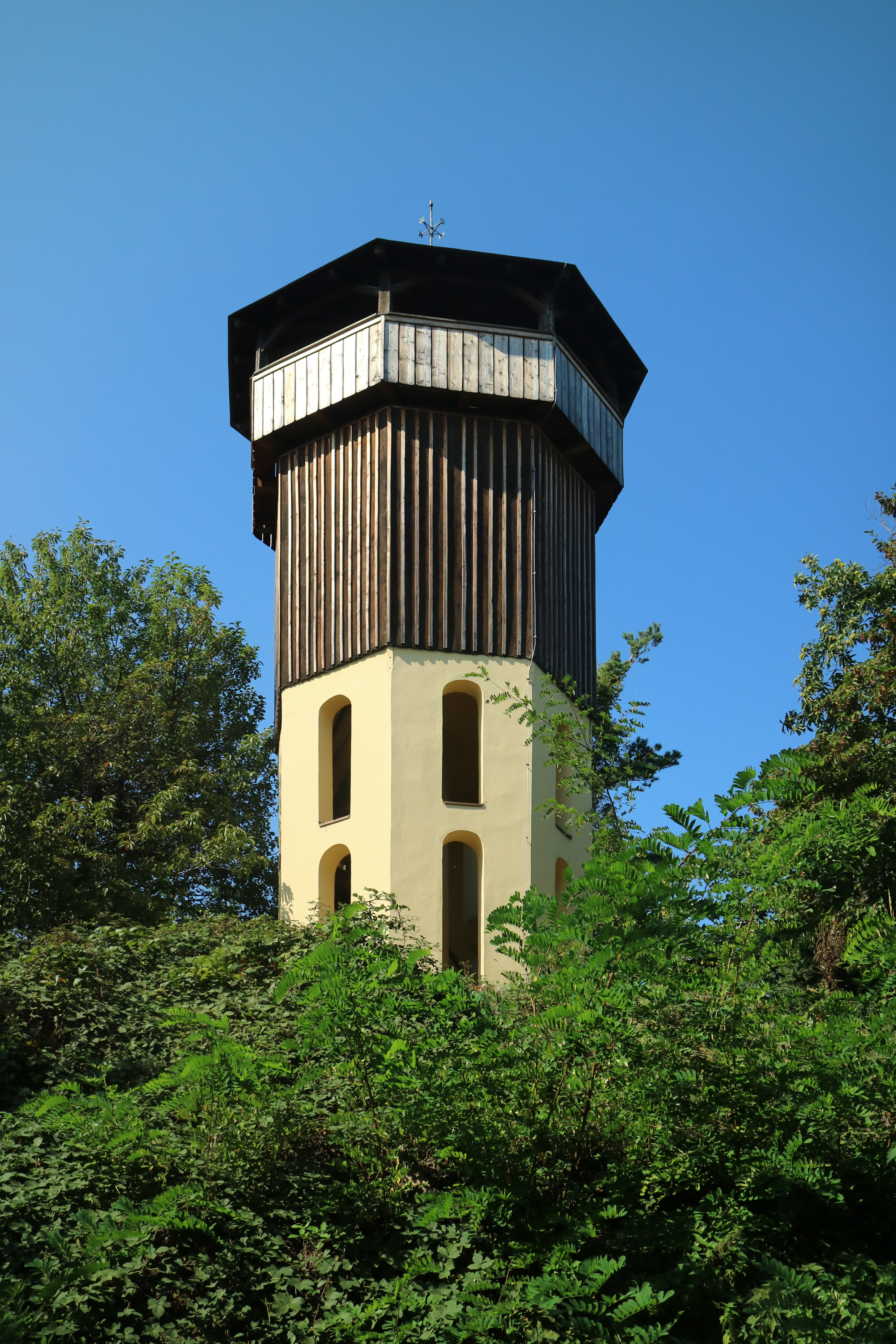 Kreuzkogelwarte von Südosten, Gemeinde Leibnitz (Südsteiermark)